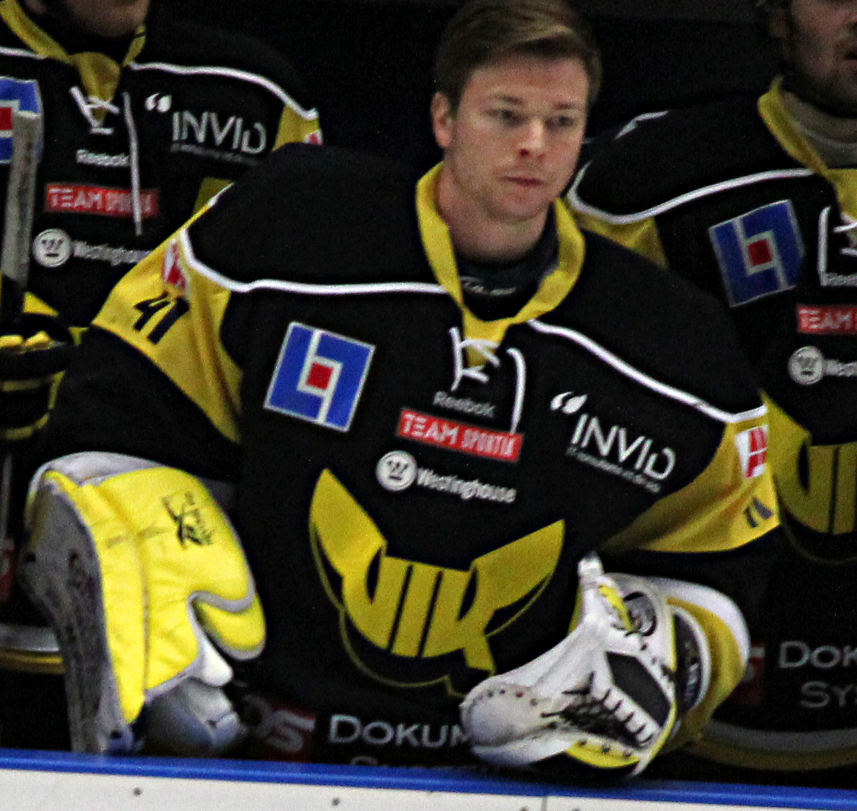 Daniel Sperrle för VIK Västerås HK mot Leksands IF i Tegera Arena 29 januari 2011.